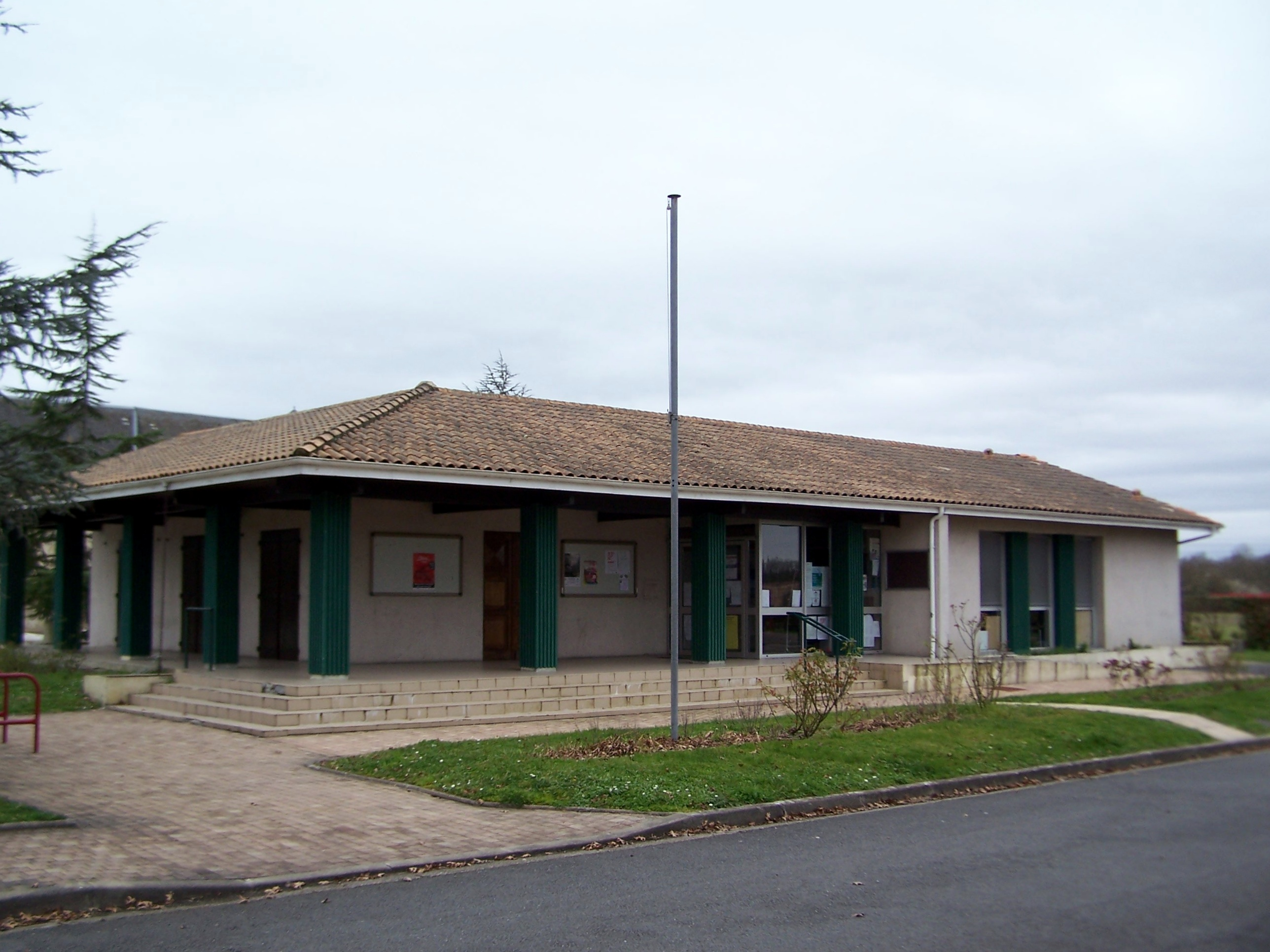 Mairie de Saint-Vincent-de-Paul (Gironde, France)